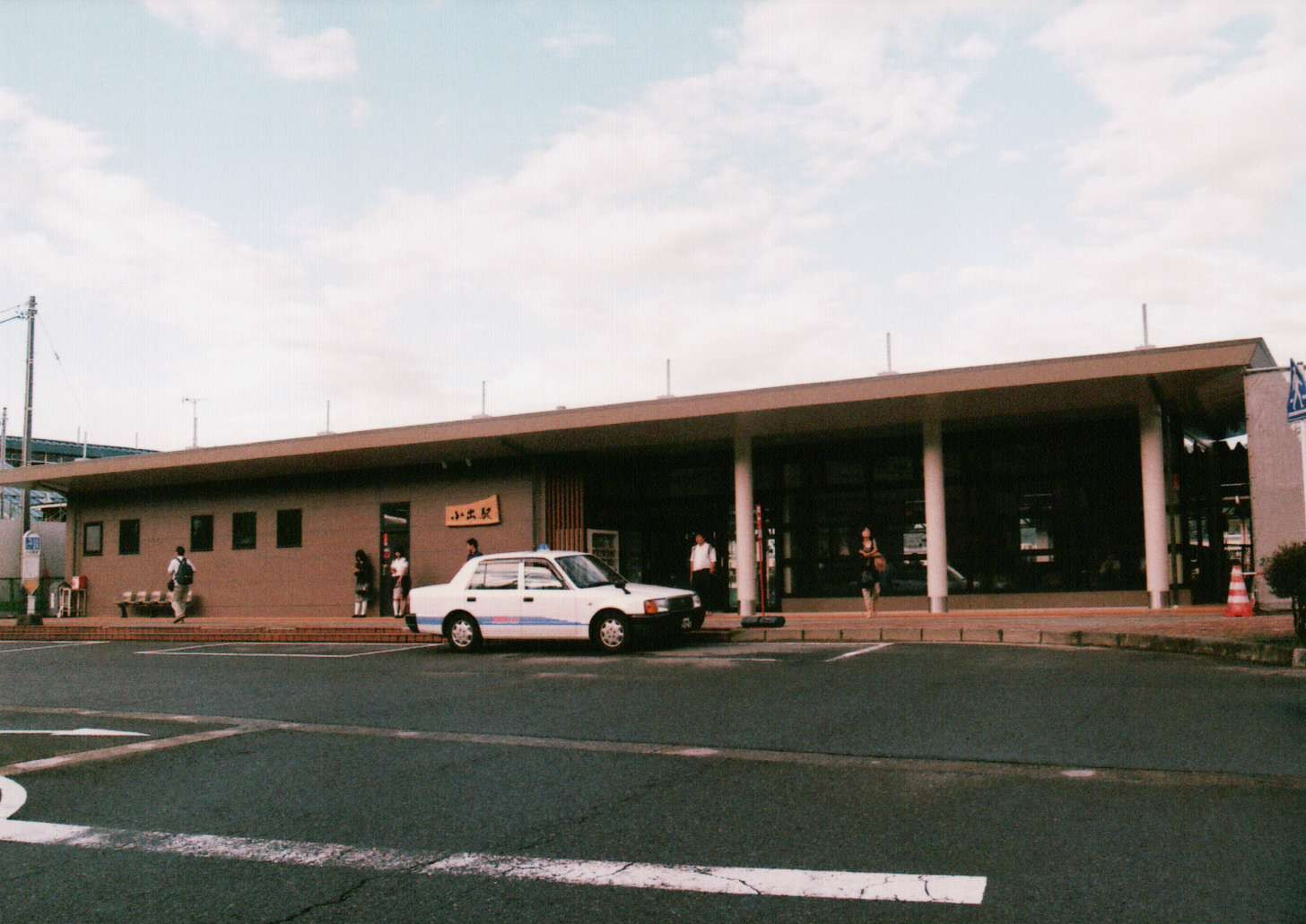 小出駅(2011/09/23)